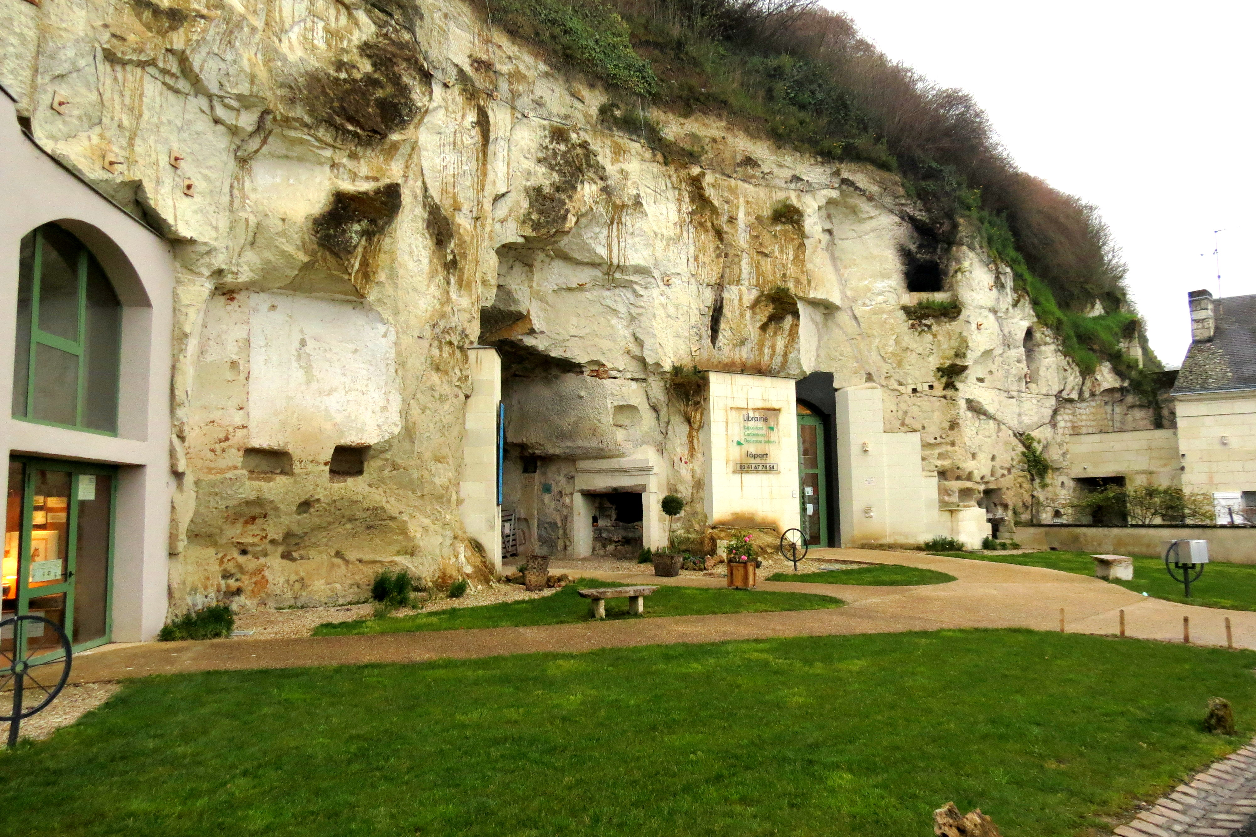 Les châteaux de la Loire.